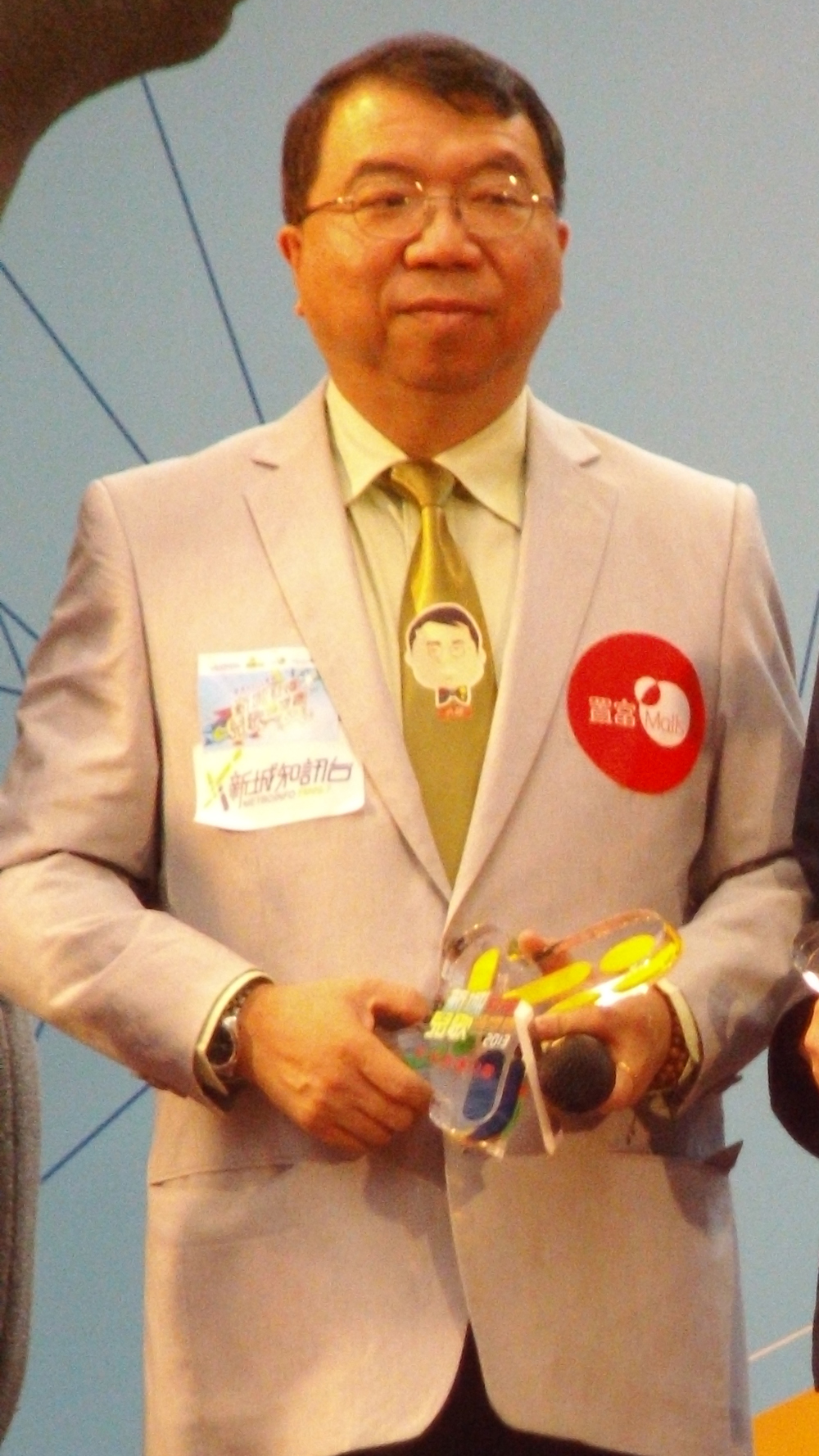 中文（香港）: 李家仁的樣子